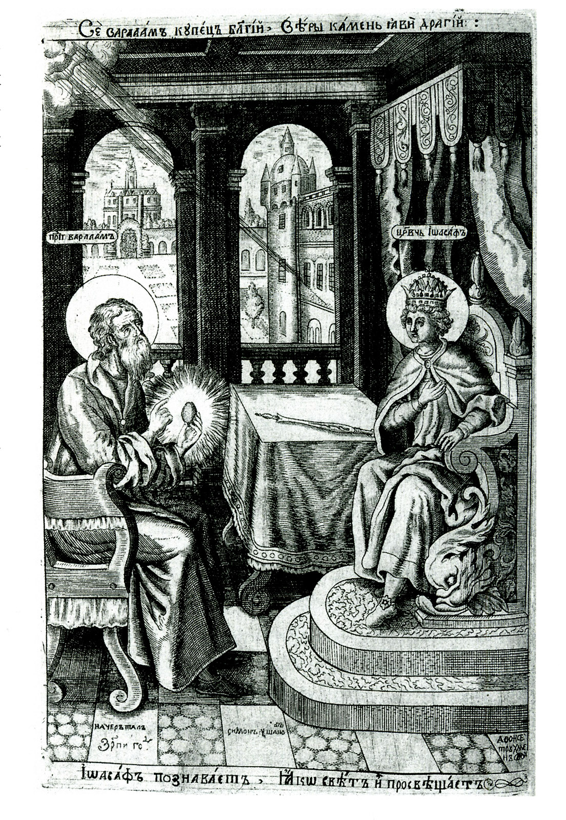 Varlaam and Joasaph, a 1680 Russian engraving